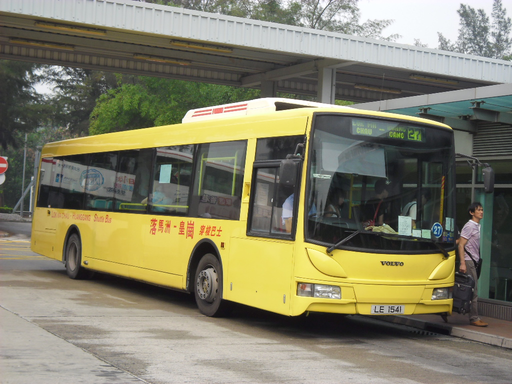 捷聯JL-08車身，只用於2003年富豪B7RLE車身上。